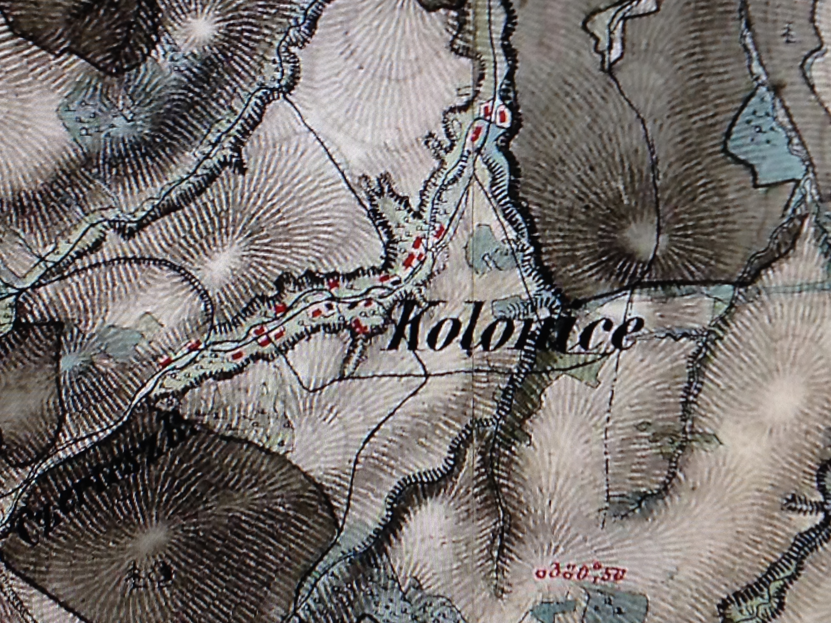 Колоничі на карті кін. 18 ст.